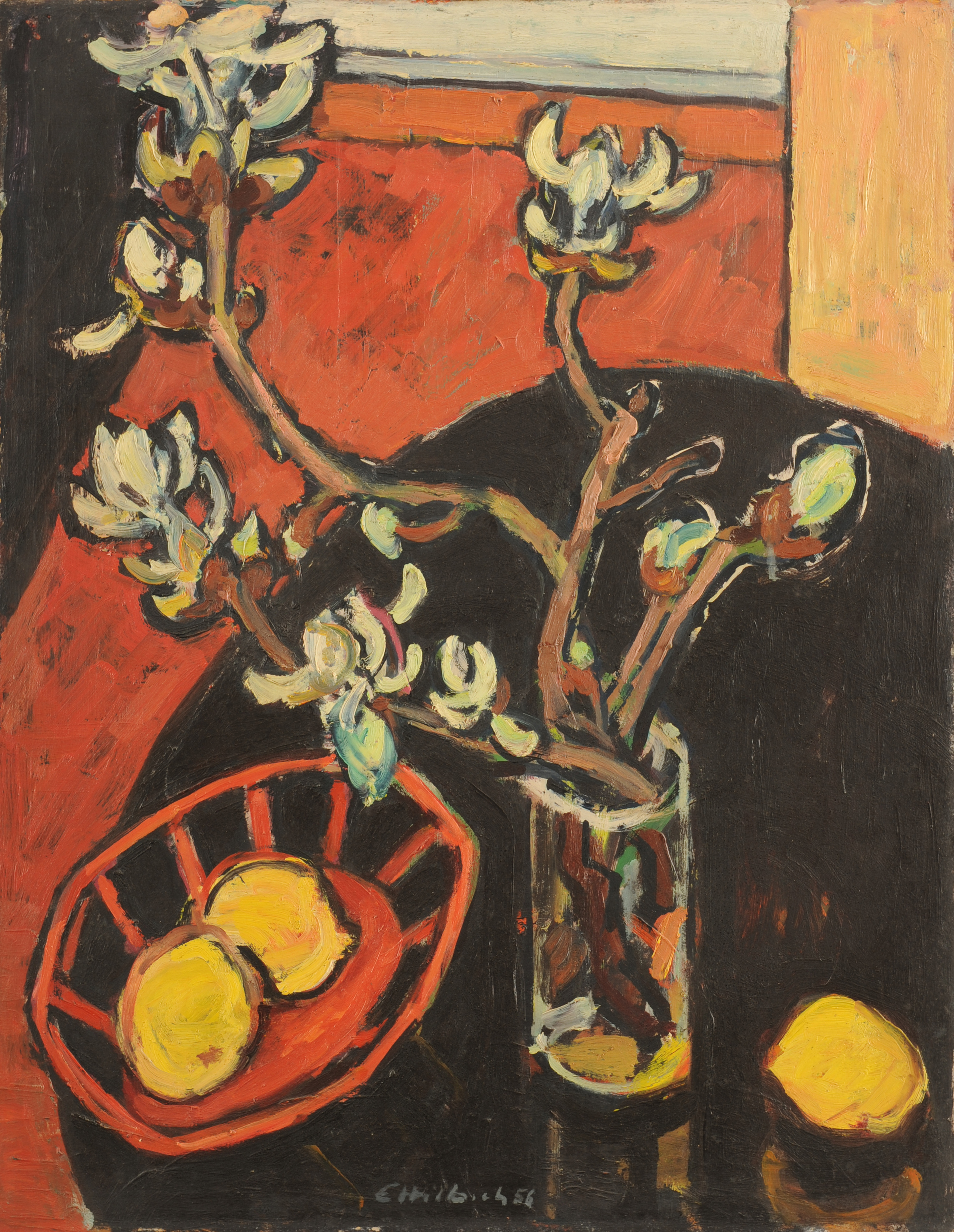 Engelbert Hilbich (1923-2011), Maler. In seinen Stillleben arrangierte er Objekte, die ihn in seinem Alltag begleiteten.